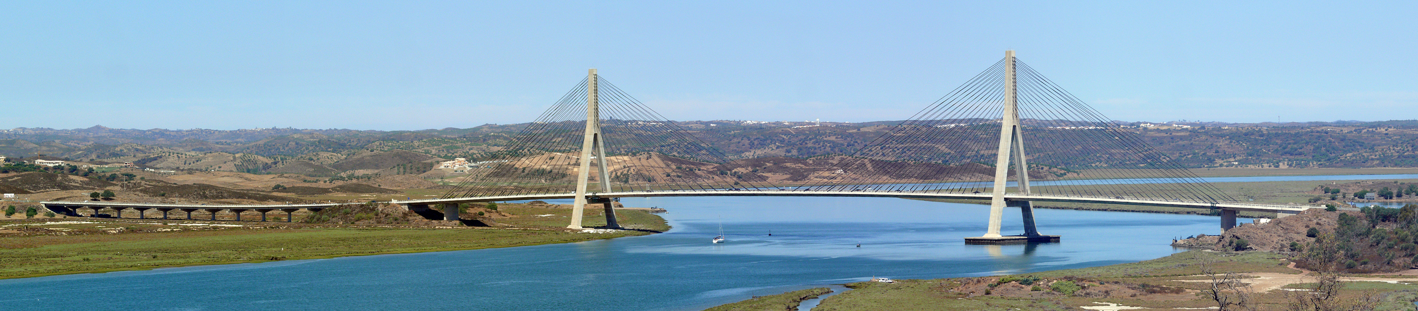 Puente Internacional del Guadiana, que une por carretera a España y Portugal.